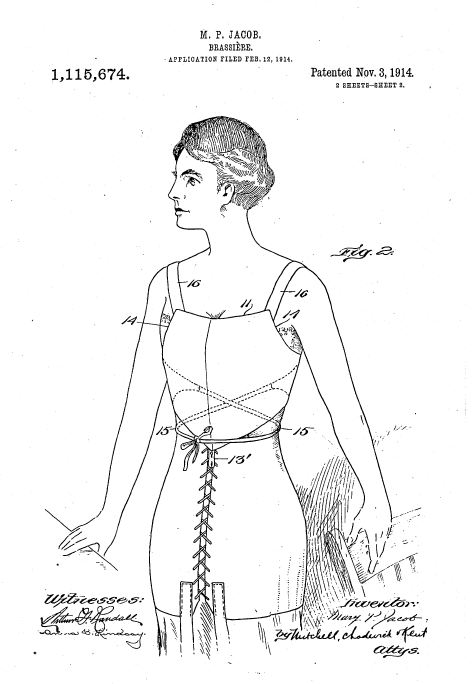 US Patent No. 1,115,674, page 2